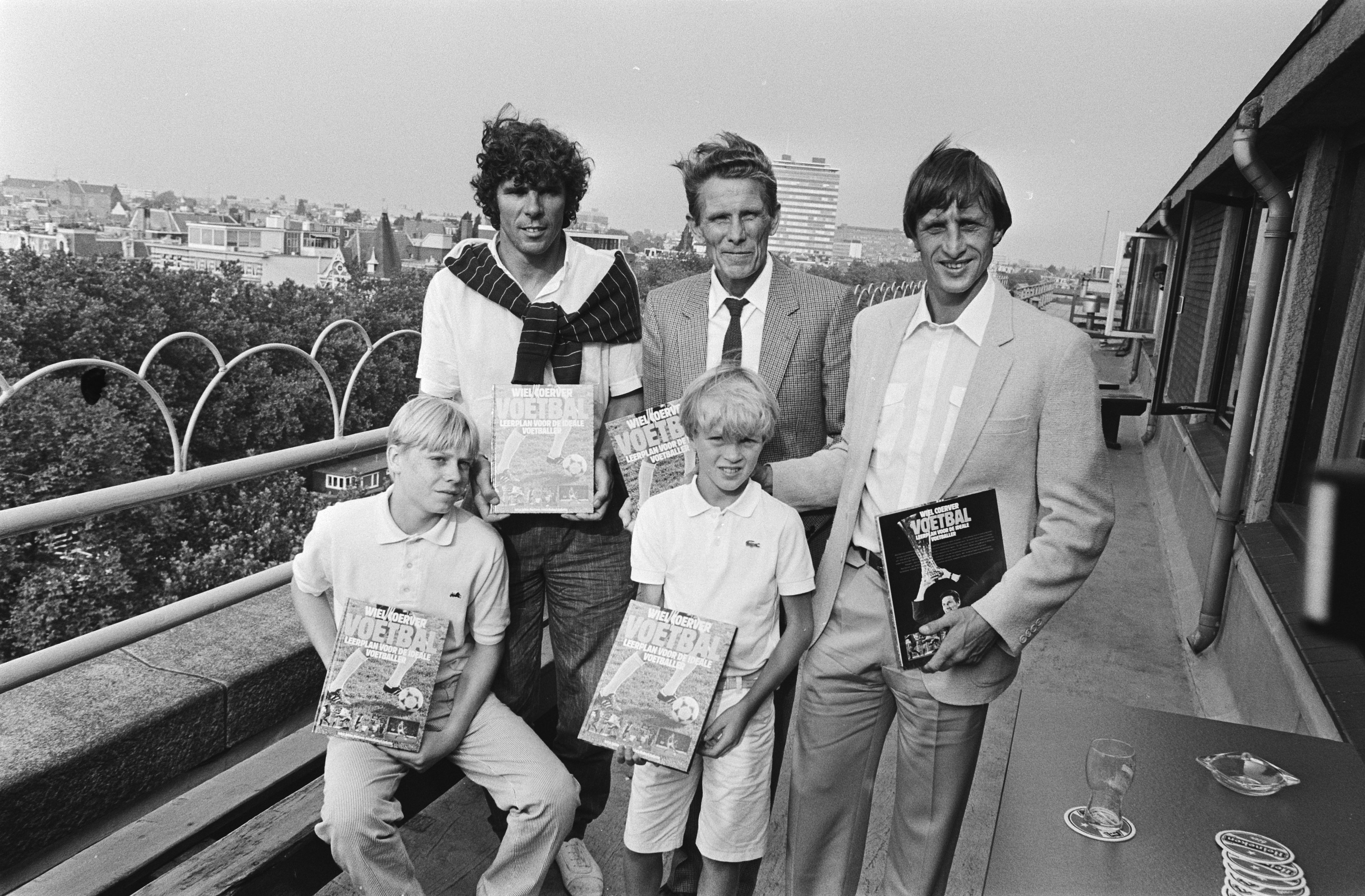 Collectie / Archief : Fotocollectie Anefo Reportage / Serie : Presentatie van het boek 'Voetbal: leerplan voor de ideale voetballer' van Wiel Coerver Beschrijving : Wiel Coerver (m) met Johan Cruijff (r) en Wim van Hanegem Datum : 8 augustus 1983 Trefwoorden : boeken, voetbal Persoonsnaam : Coerver, Wiel, Cruijff, Johan, Hanegem, Willem van Fotograaf : Bogaerts, Rob / Anefo Auteursrechthebbende : Nationaal Archief Materiaalsoort : Negatief (zwart/wit) Nummer archiefinventaris : bekijk toegang 2.24.01.05 Bestanddeelnummer : 932-6620